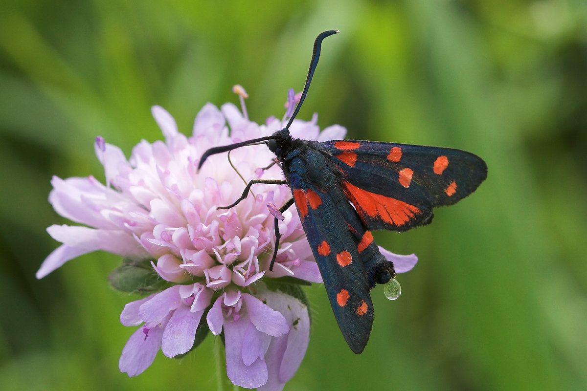 Veraenderliches Widderchen(Zygaena ephialtes)